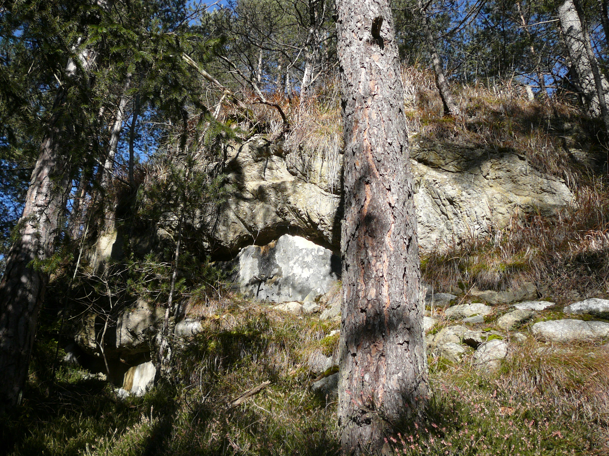 Opera 31 - Sbarramento Rienza -Rio Valles-Sciaves